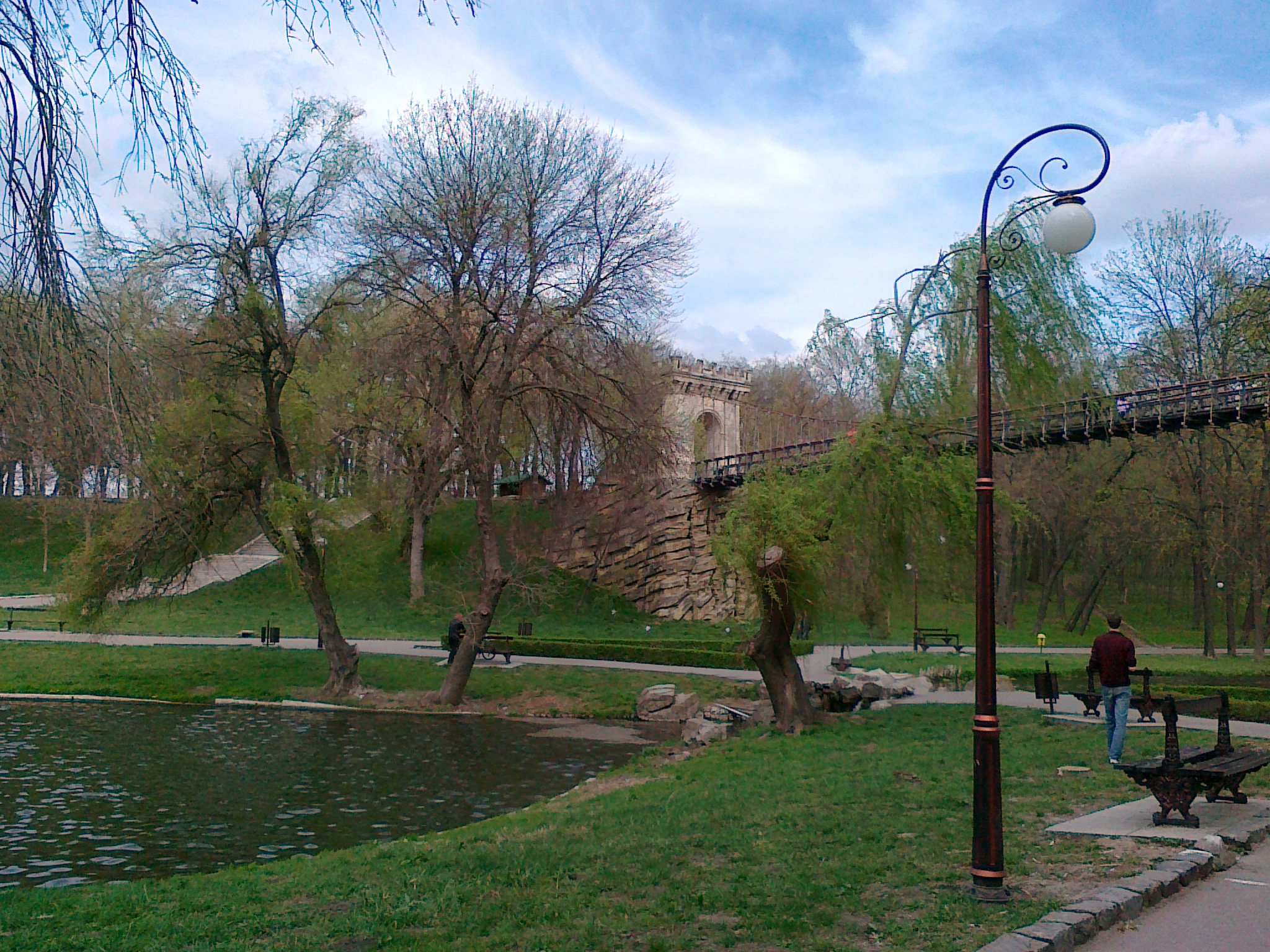 Parcul Nicolae Romanescu (fostul Parc Bibescu)